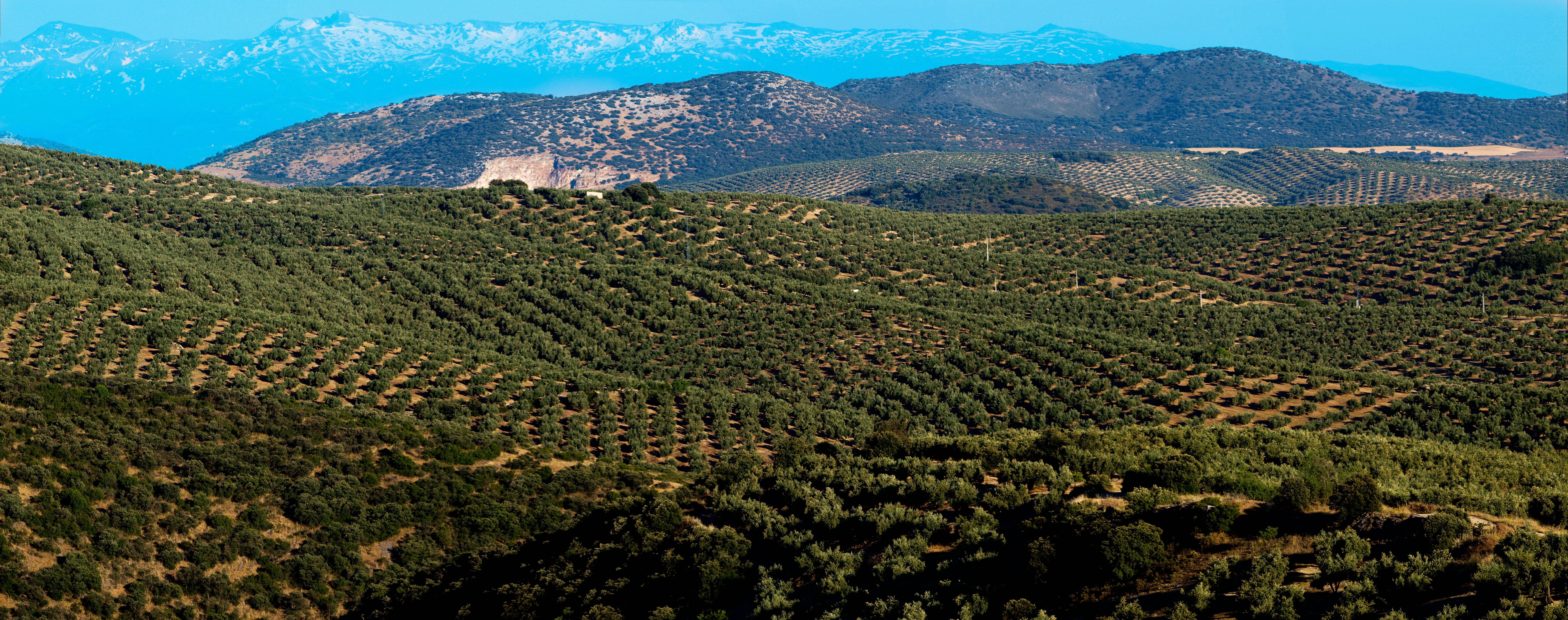 Paisaje de la Sierra Sur de Jaén. Nuestros campos de Olivos a finales de primavera.